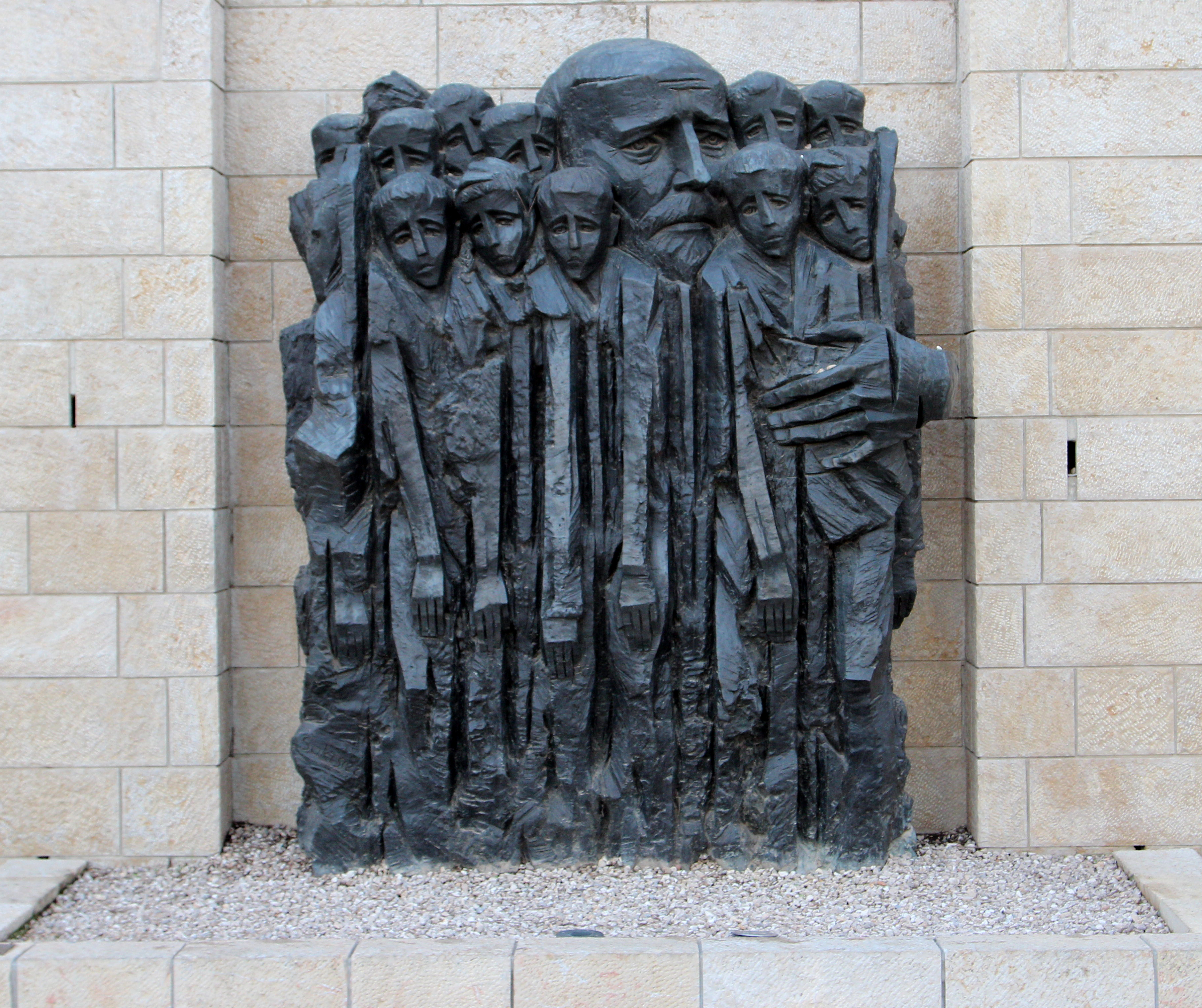 Memorial, Yad Vashem, Jerusalem Israel